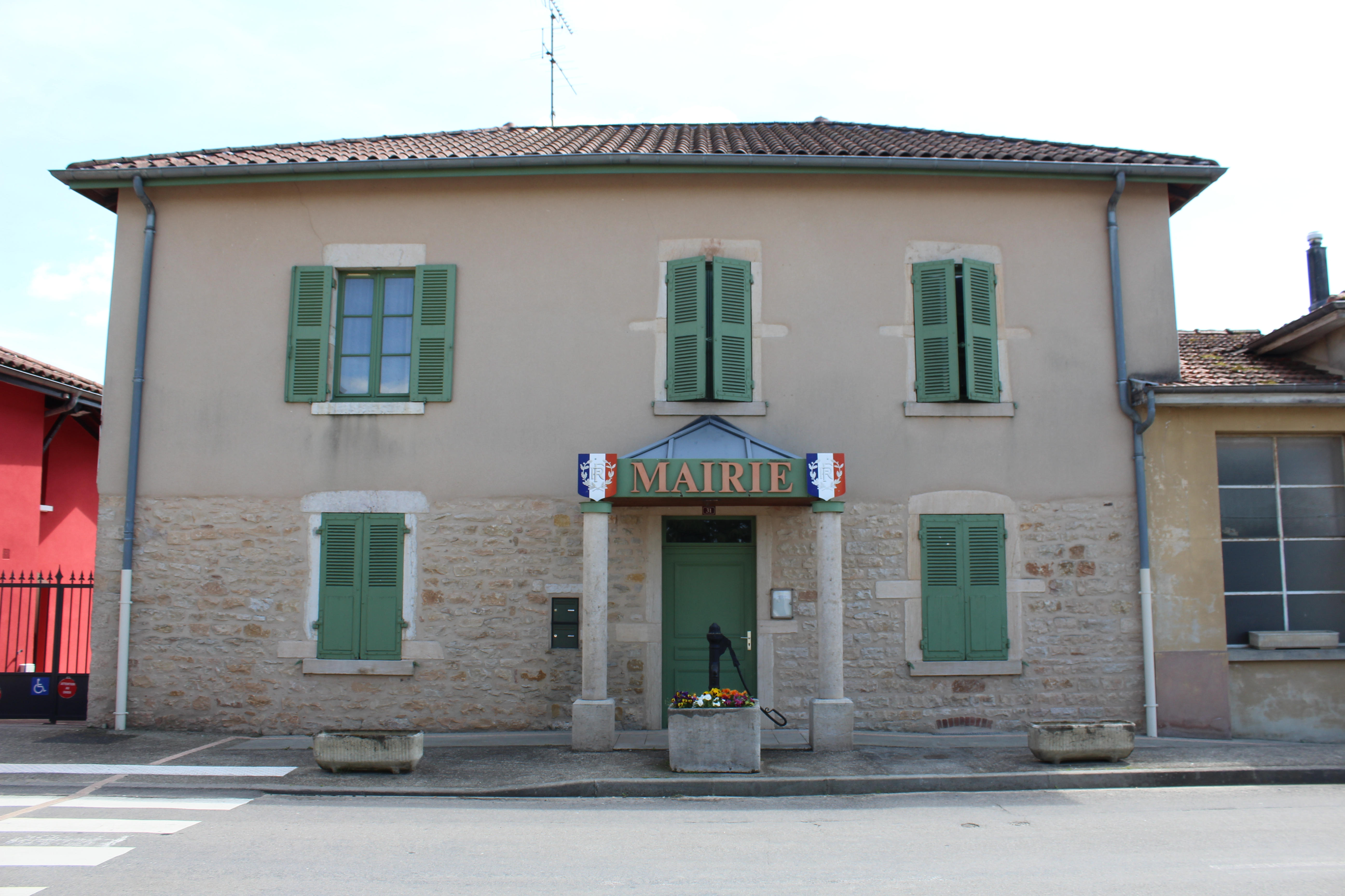 Mairie de Montcet.